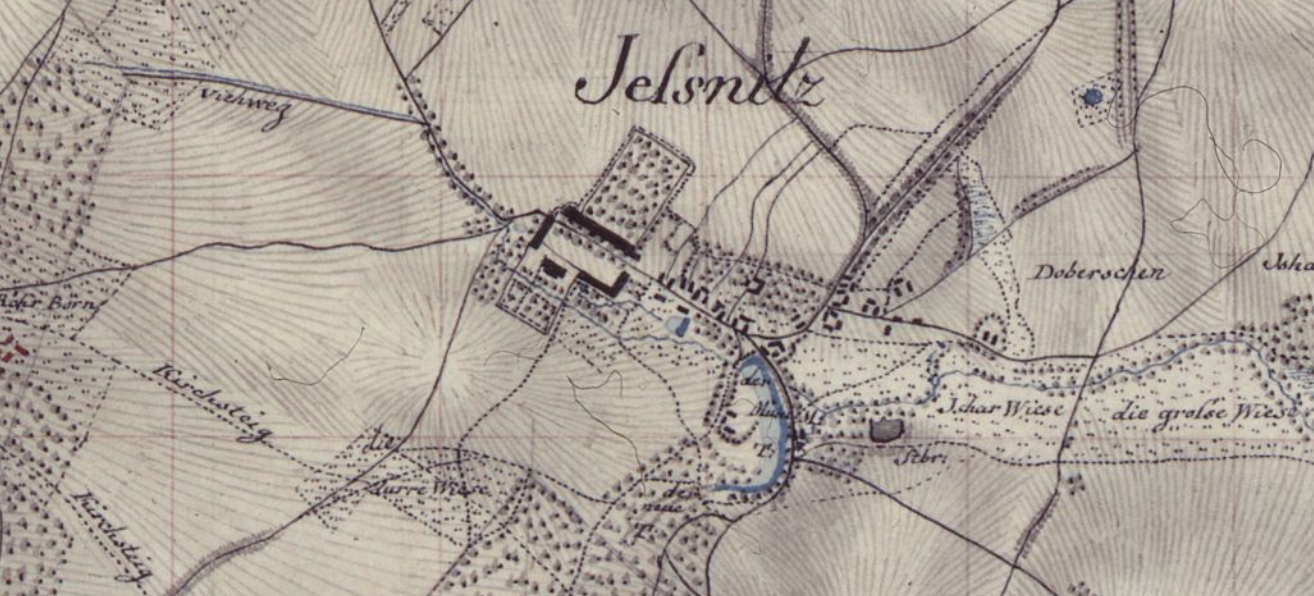 Hornjoserbsce: Jaseńca na starej sakskej karće (mjez 1819 a 1834).